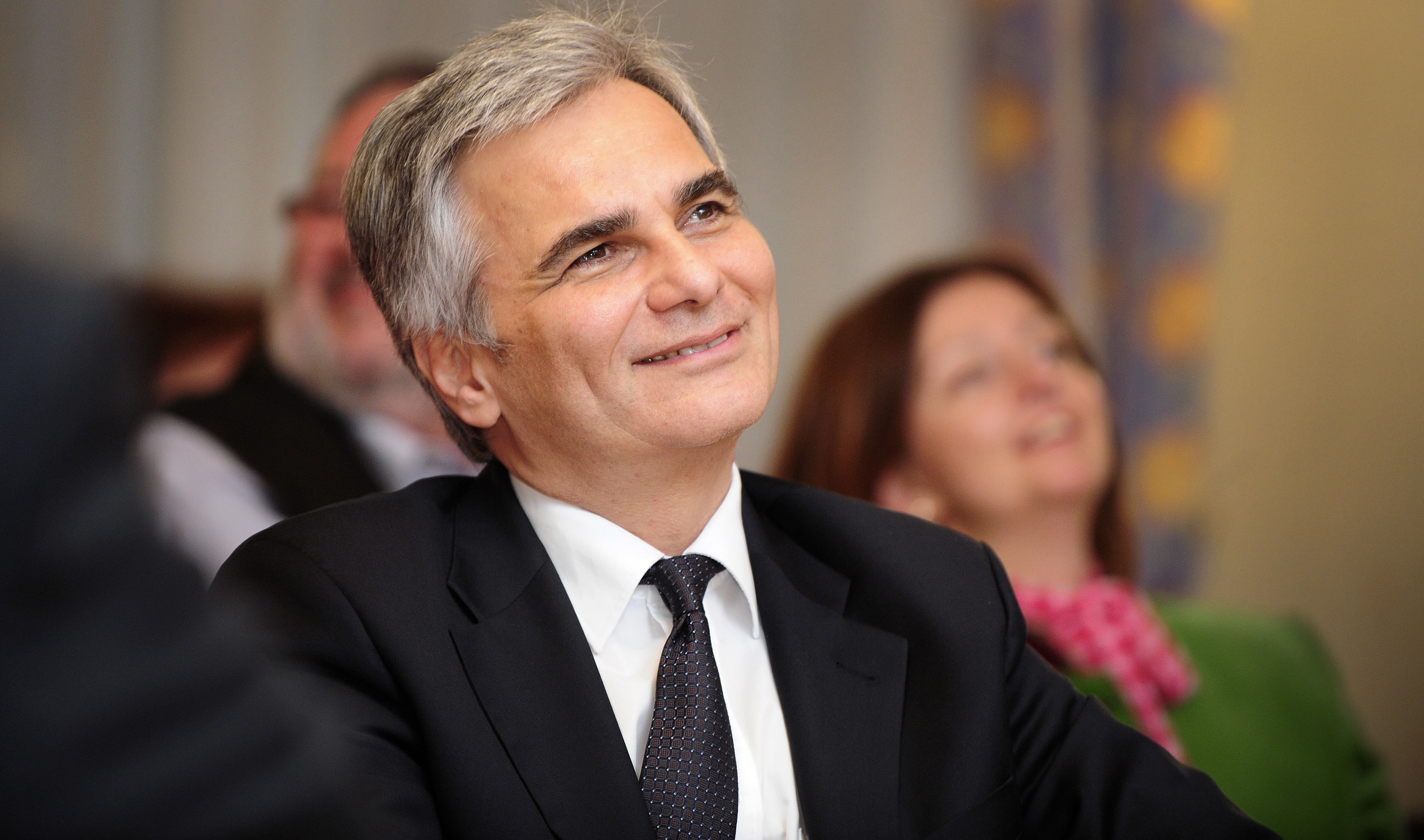 Bundeskanzler Werner Faymann besucht zur Untersützung der lokalen Kandidatin zur niederösterreichischen Landtagswahl Heidemaria Onodi die Gemeinde Gerersdorf.